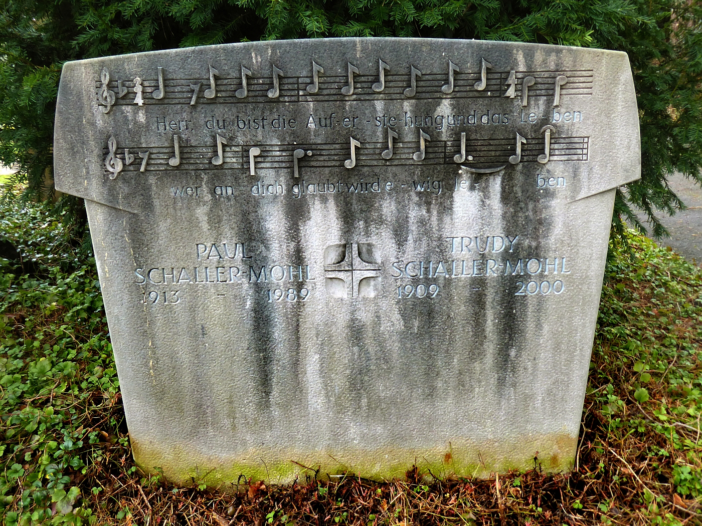 Paul Schaller-Möhl (1913–1989) Chorpädagoge, Lehrer, Chorleiter, Komponist-Lieder und Klavierwerke, Gründer und Leiter des Basler Vokalensembles, Grab auf dem Friedhof Hörnli, Riehen, Basel-Stadt